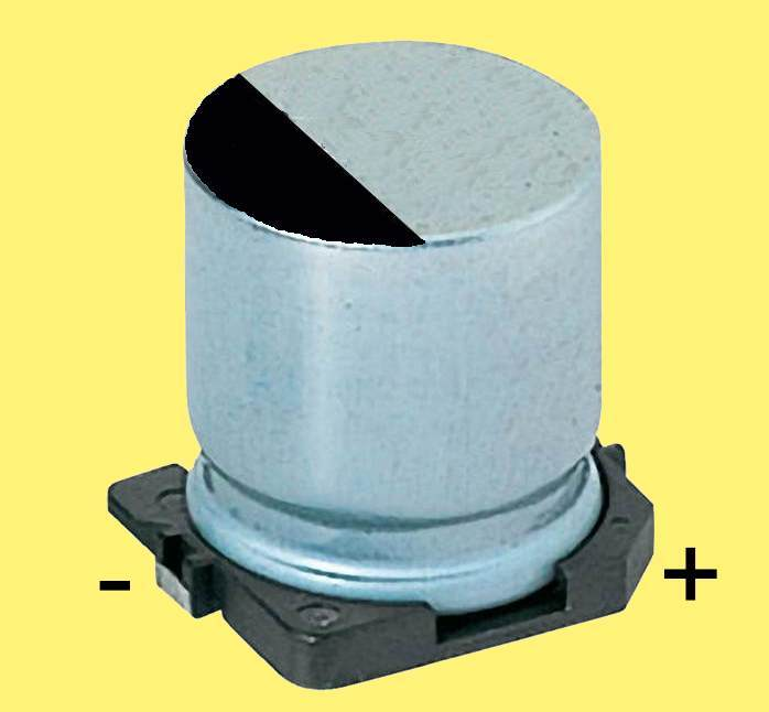 Der Elko-Minus-Anschluss ist bei der V-Chip-Bauform immer an der nicht abgeschrägten Seite des Unterlegplättchens zu erkennen